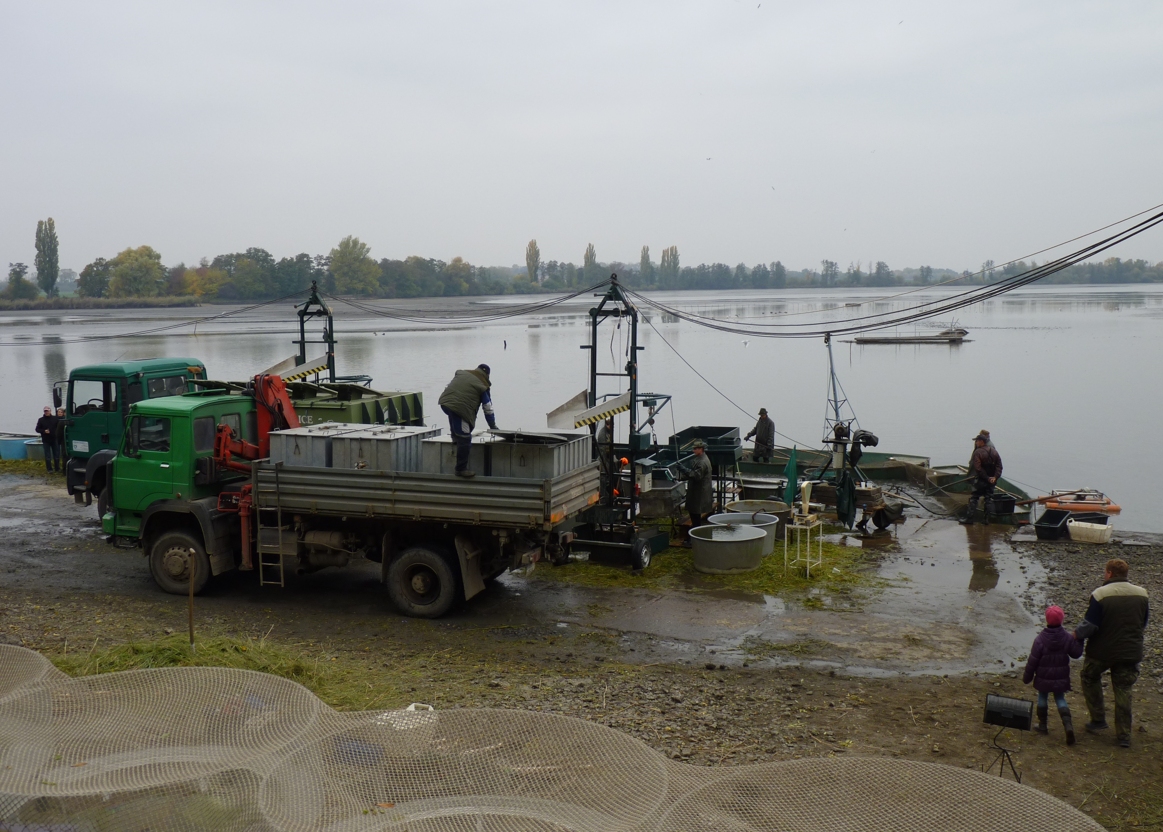 Výlov rybníka Vrkoče v okrese Břeclav, Jihomoravský kraj